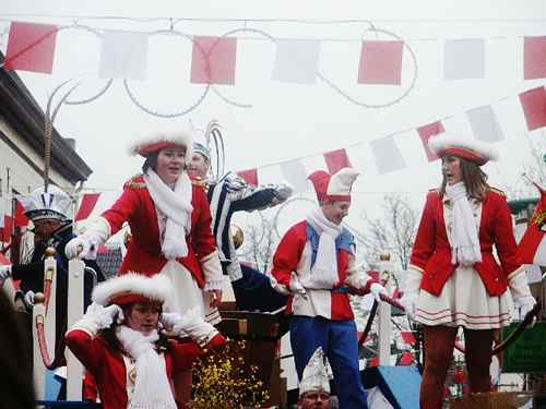 Carnaval 's-Heerenberg: Prinsenwagen met dansmariekes